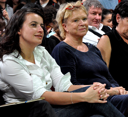 Eva Joly